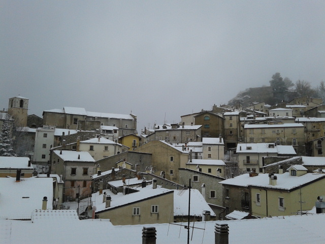 Ovindoli sotto la neve